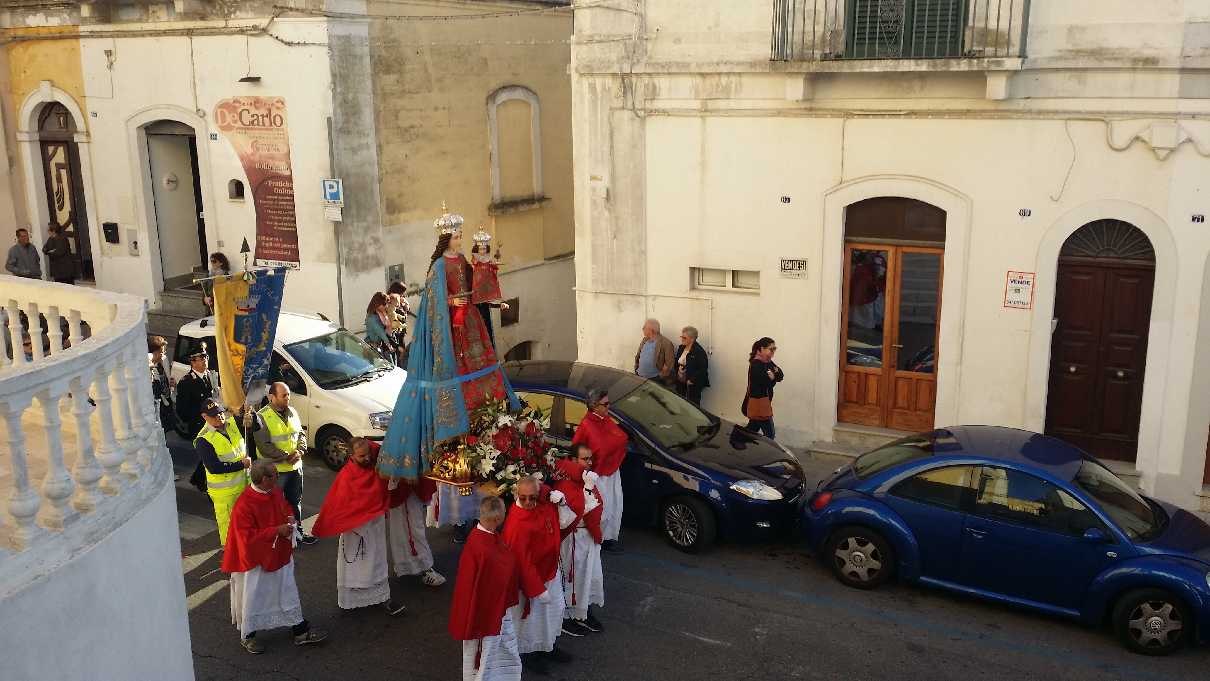 Simulacro della Vergine del Rosario portato a spalla durante la processione del 13 Ottobre